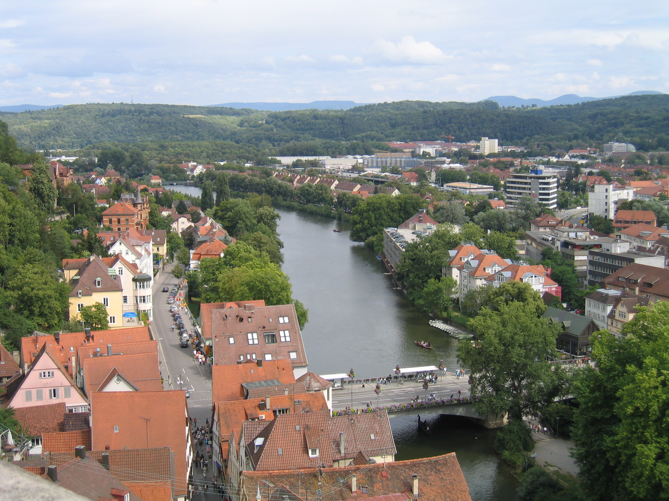 Tübingen View from Stiftskirche July 2007